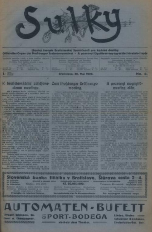 Titulný list časopisu pre konské dostihy Sulky